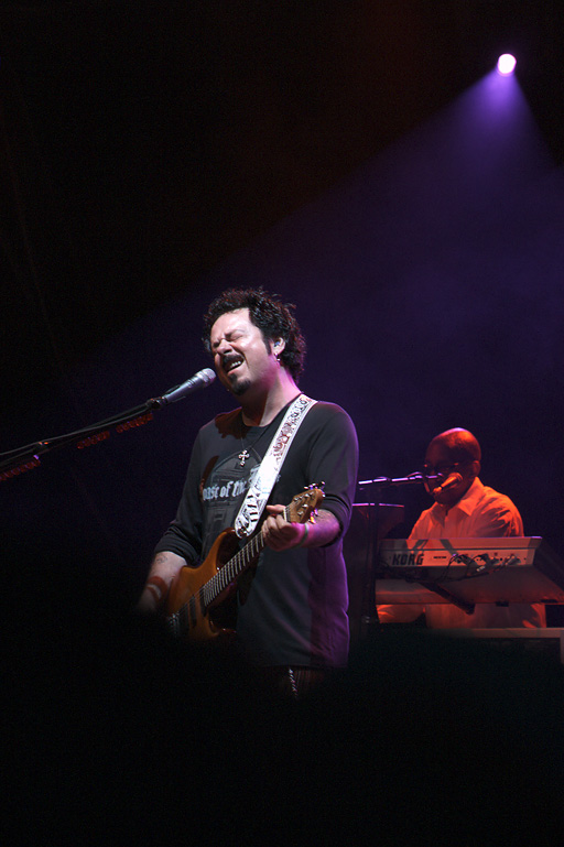 Steve Lukather in Trondheim, Norway, August 4 2007